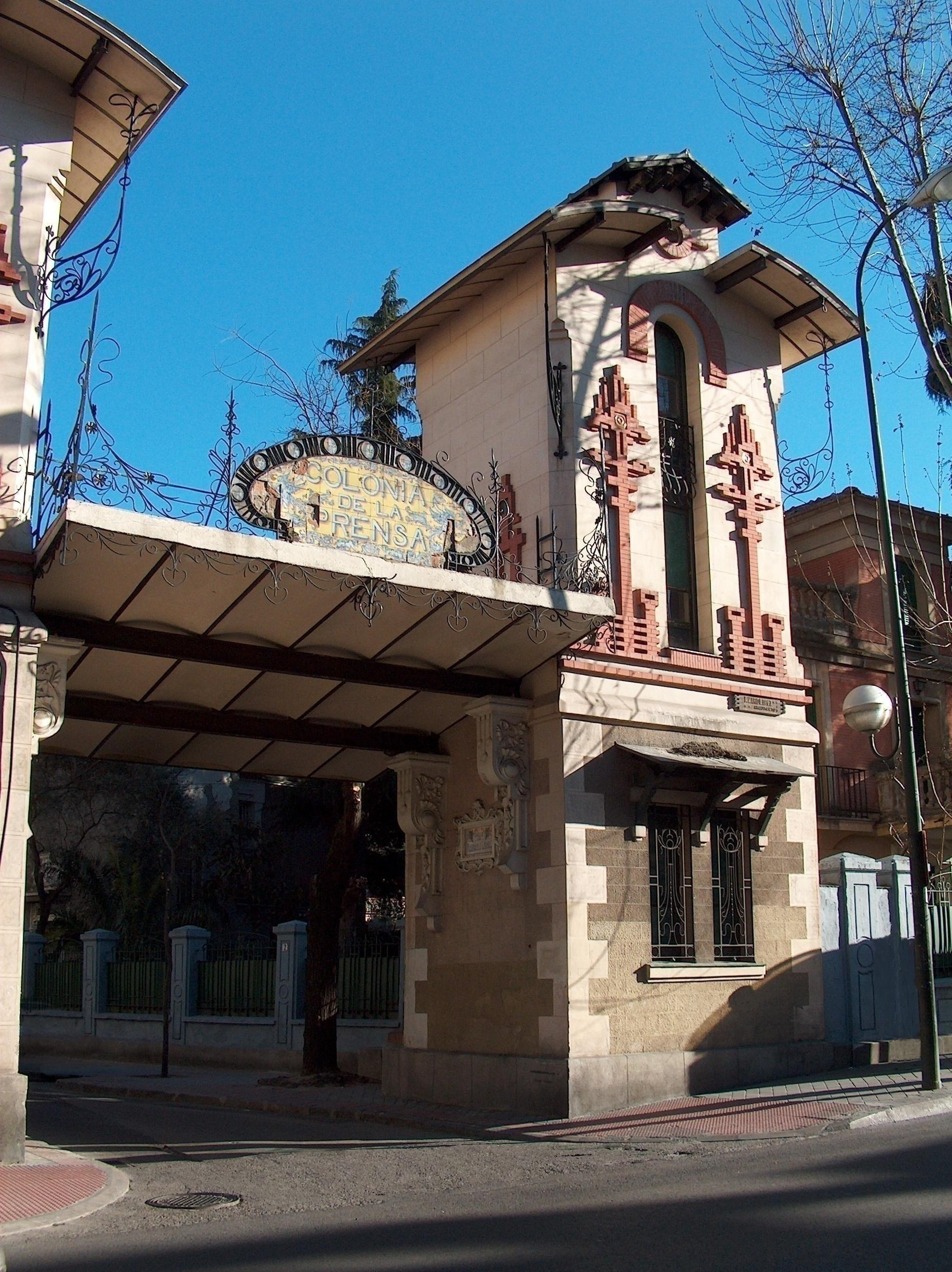 La Colonia de la Prensa: entrada en la Calle Eugenia de Montijo, 61-63, con sus 2 torreones - Madrid, España.